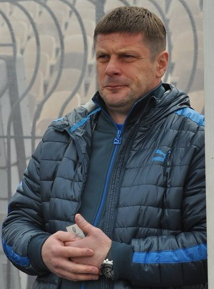 Олег Лужний — український футбольний тренер